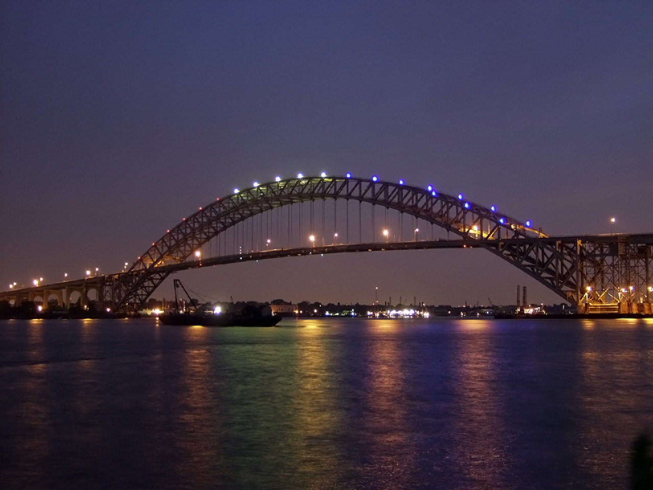 pont bayonne